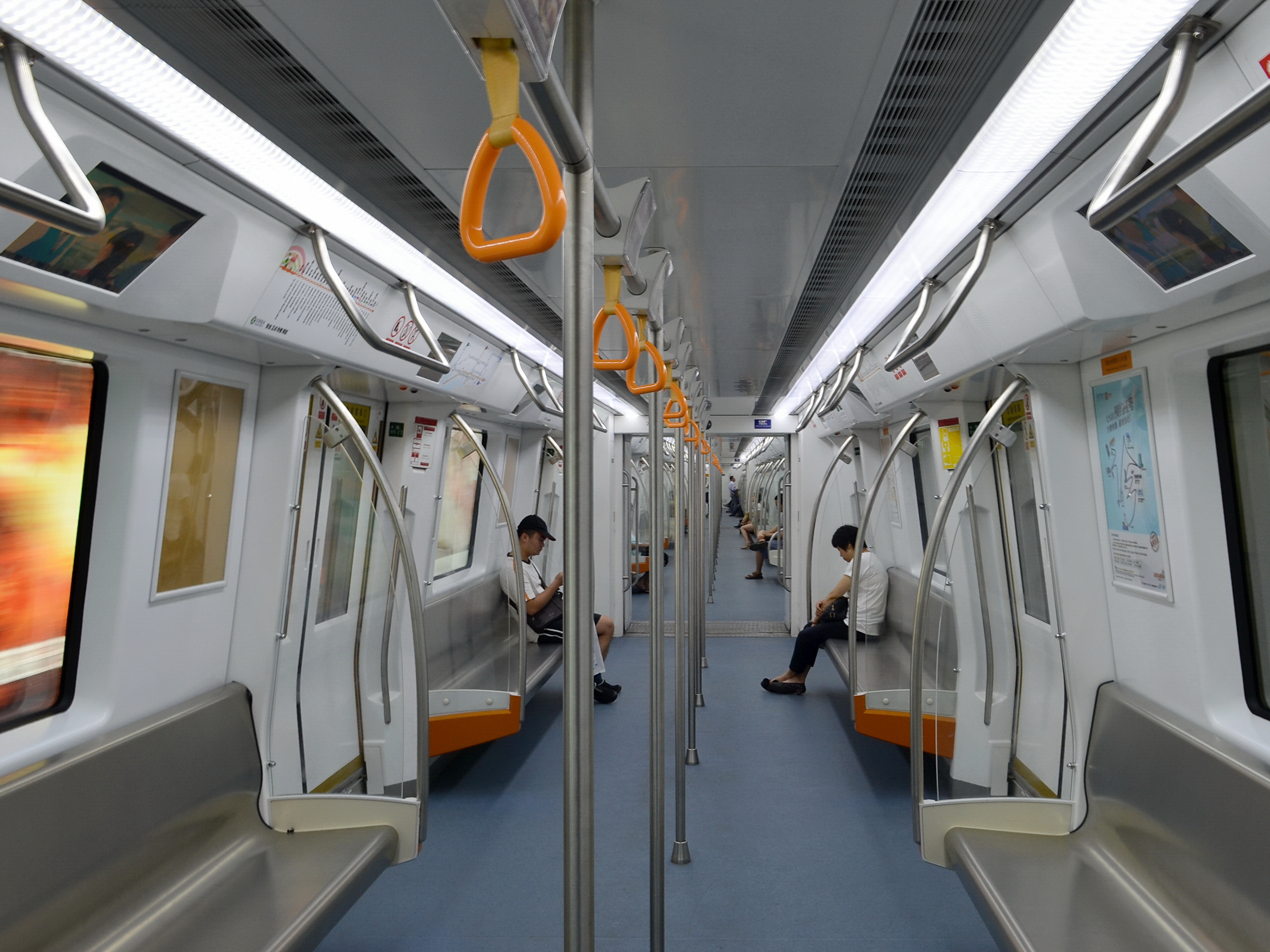 深圳地铁蛇口线列车内部